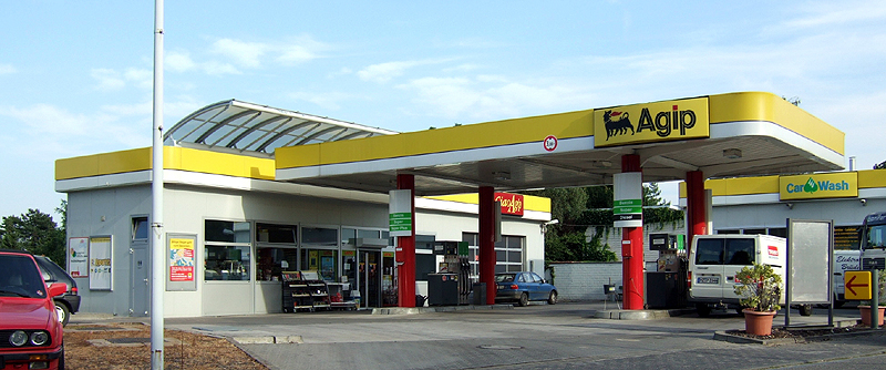 Agip Tankstelle